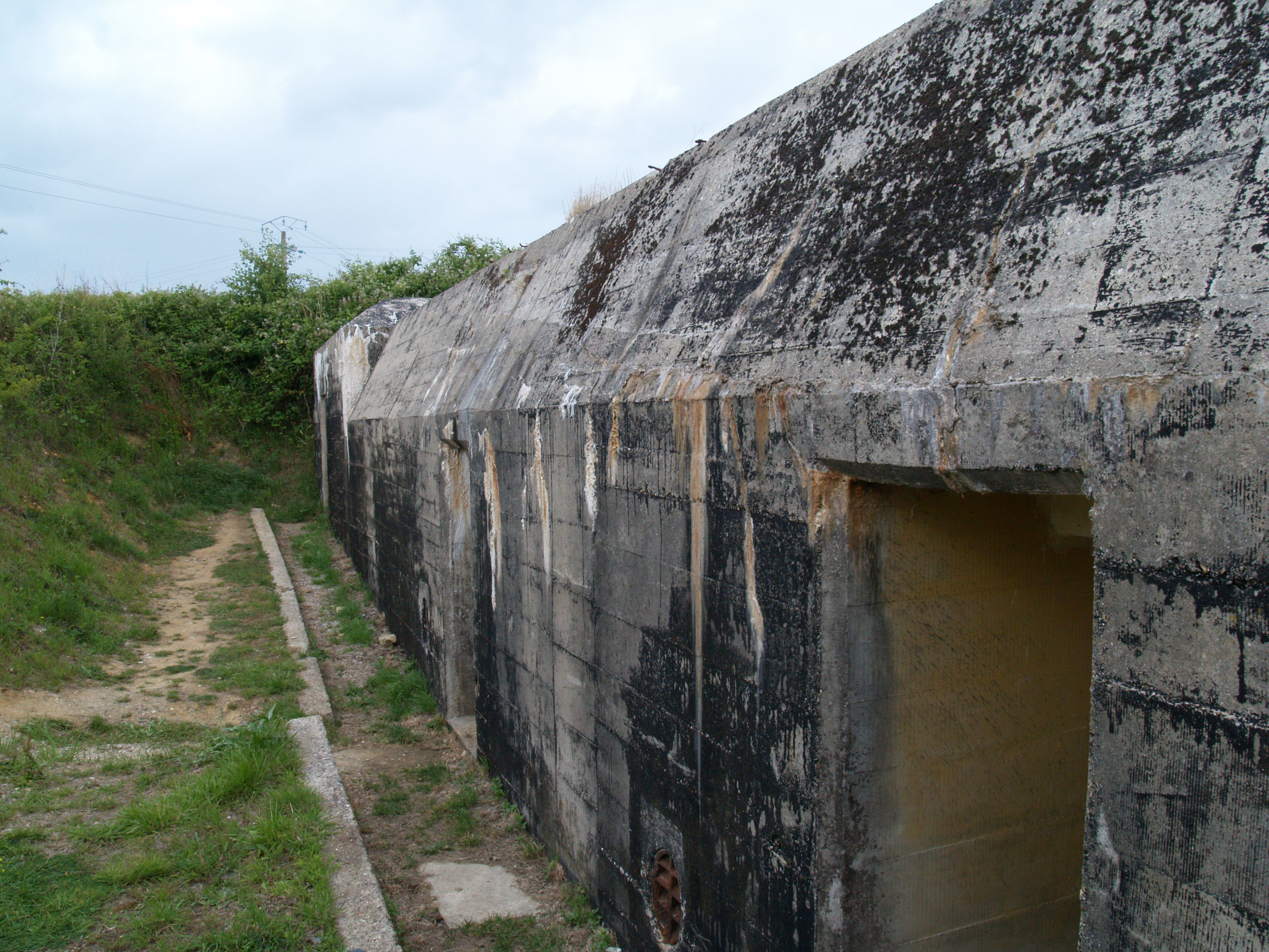 Maisy Battery